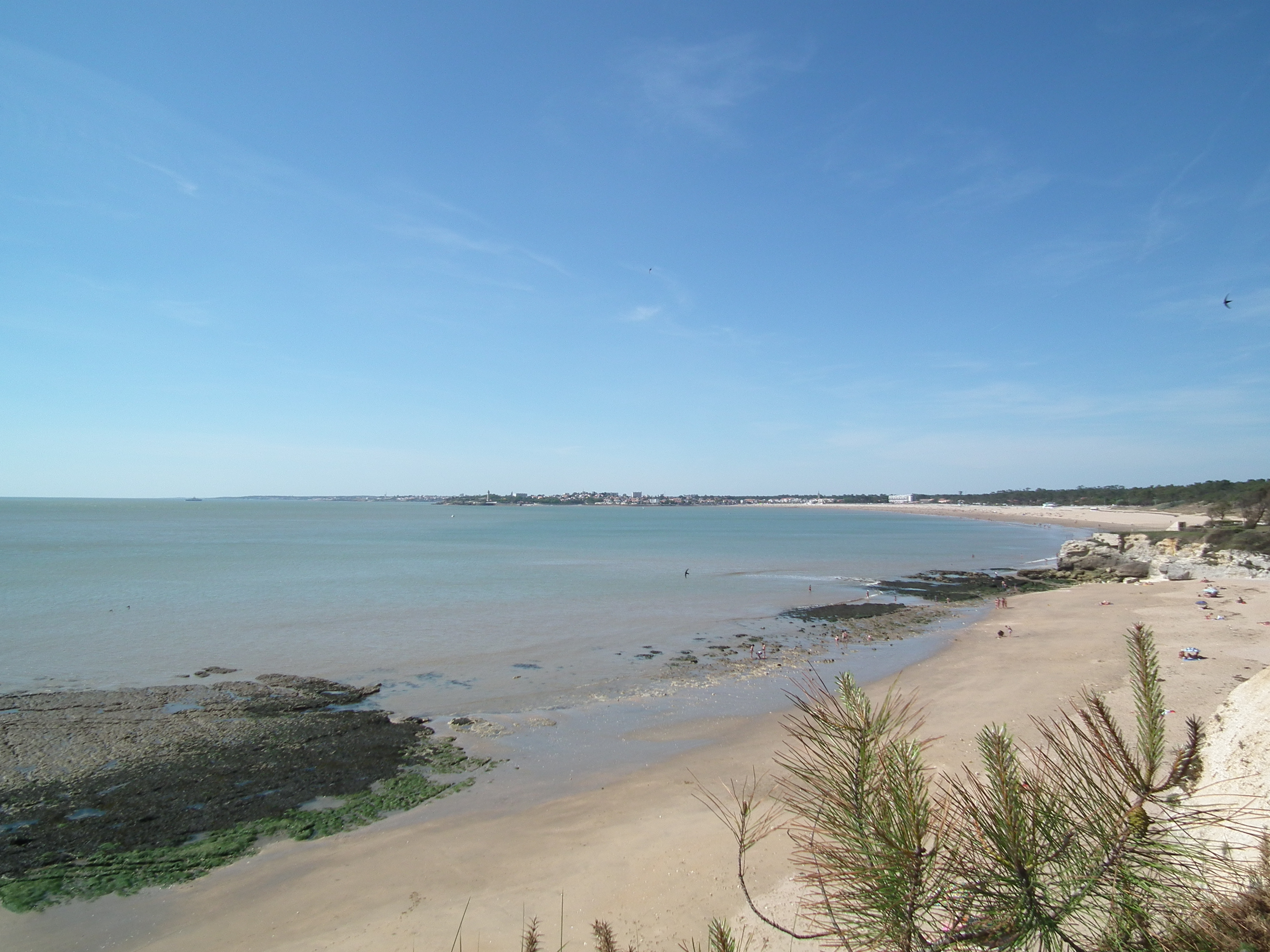 Vue sur les différentes plages de Saint-Georges-de-Didonne